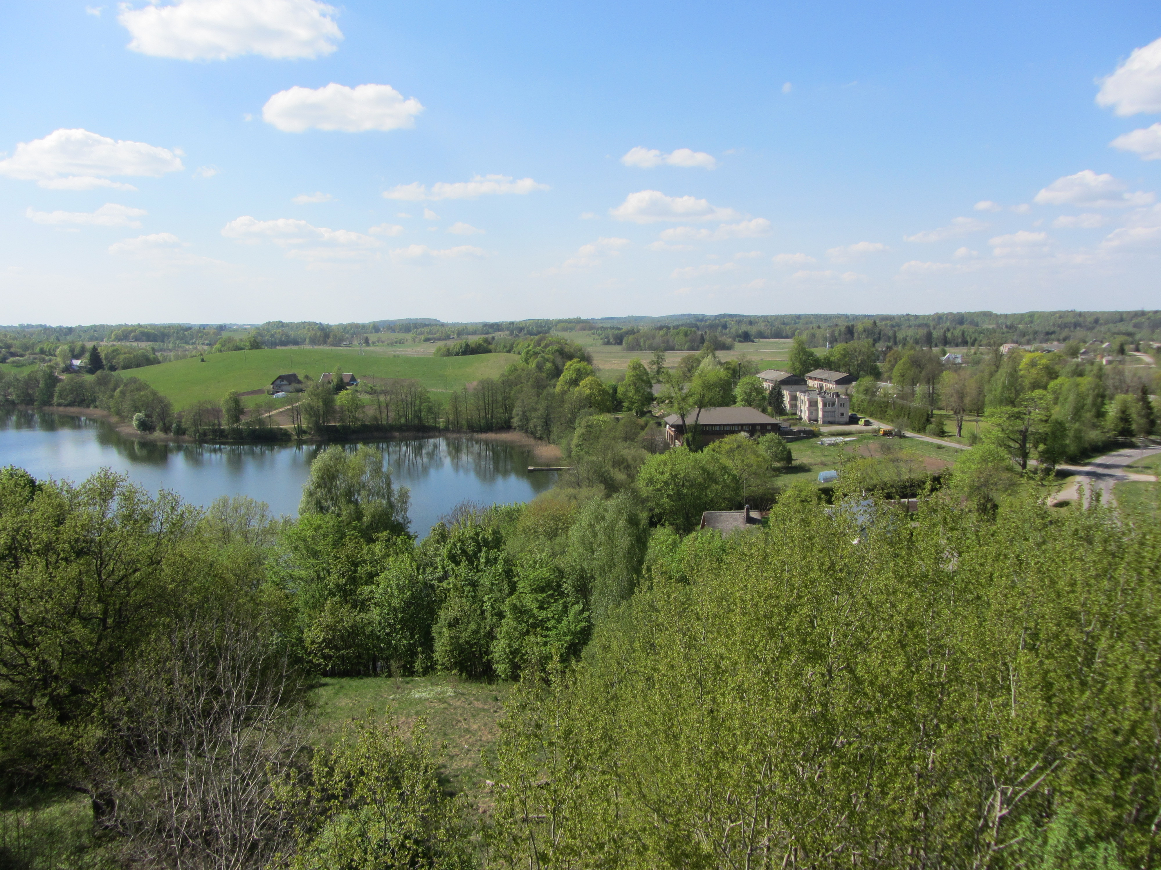 Bijutiškis 33254, Lithuania